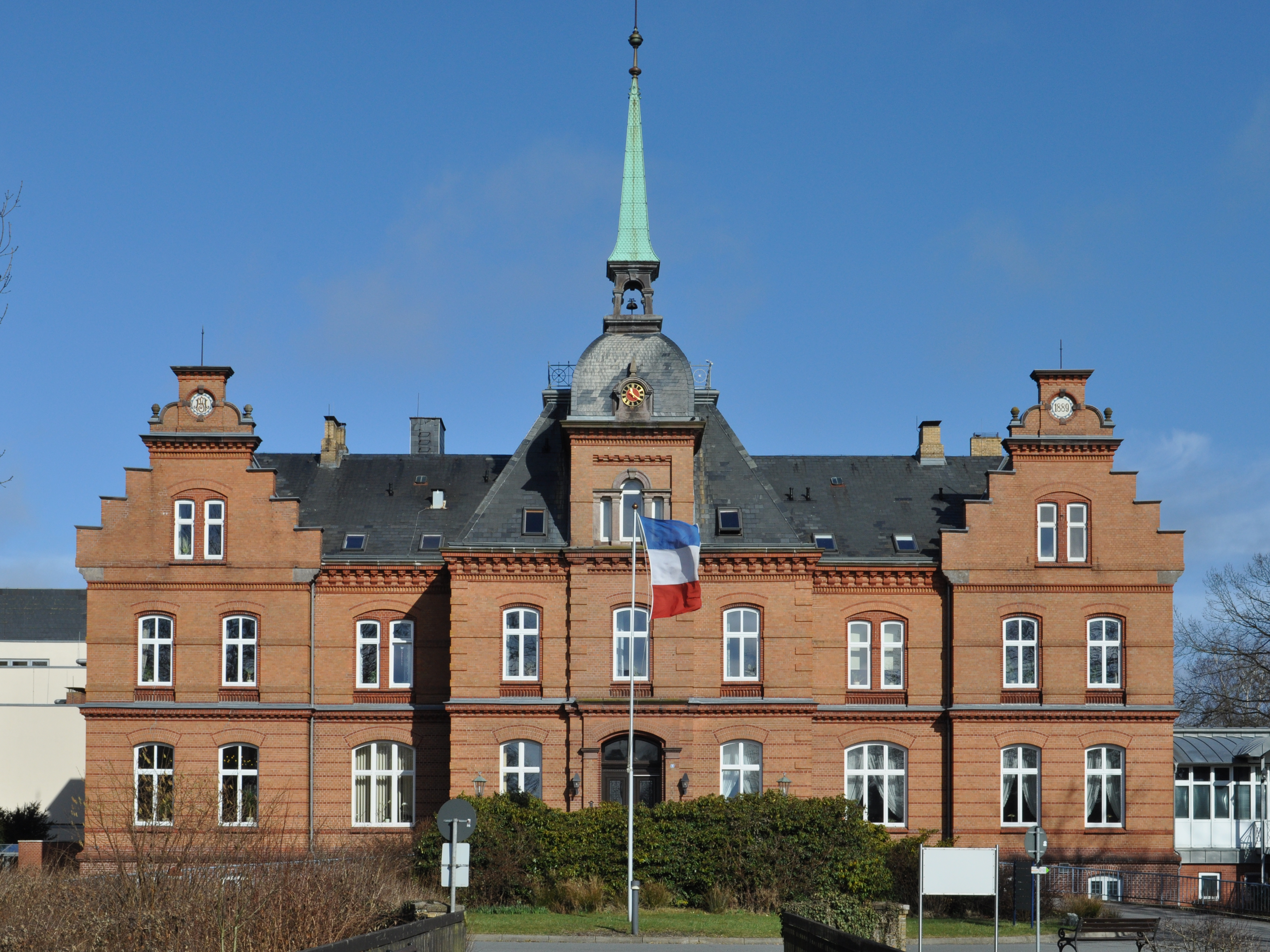 Schloss Schönhagen im Ortsteil Schönhagen der Gemeinde Brodersby in Schwansen.